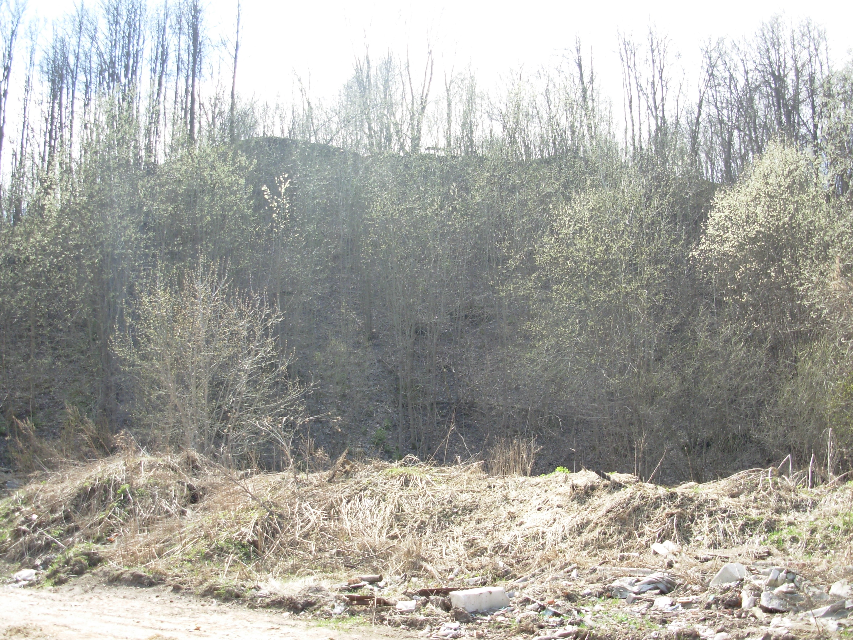 Беларуская (тарашкевіца): Вусьцянскае гарадзішча